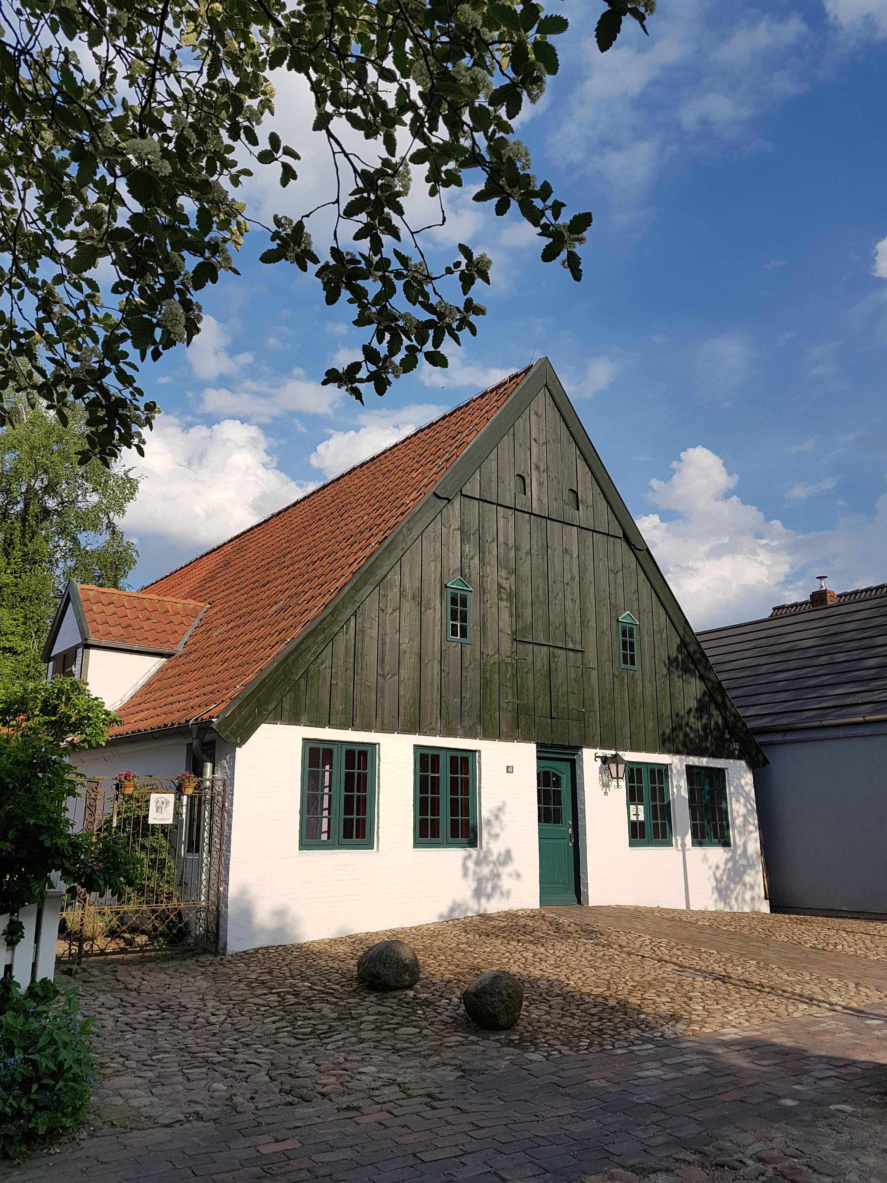 Geburtshaus von Klaus Groth, erbaut 1796. Seit 1914 beherbergt dieses Gebäude das Klaus-Groth-Museum.